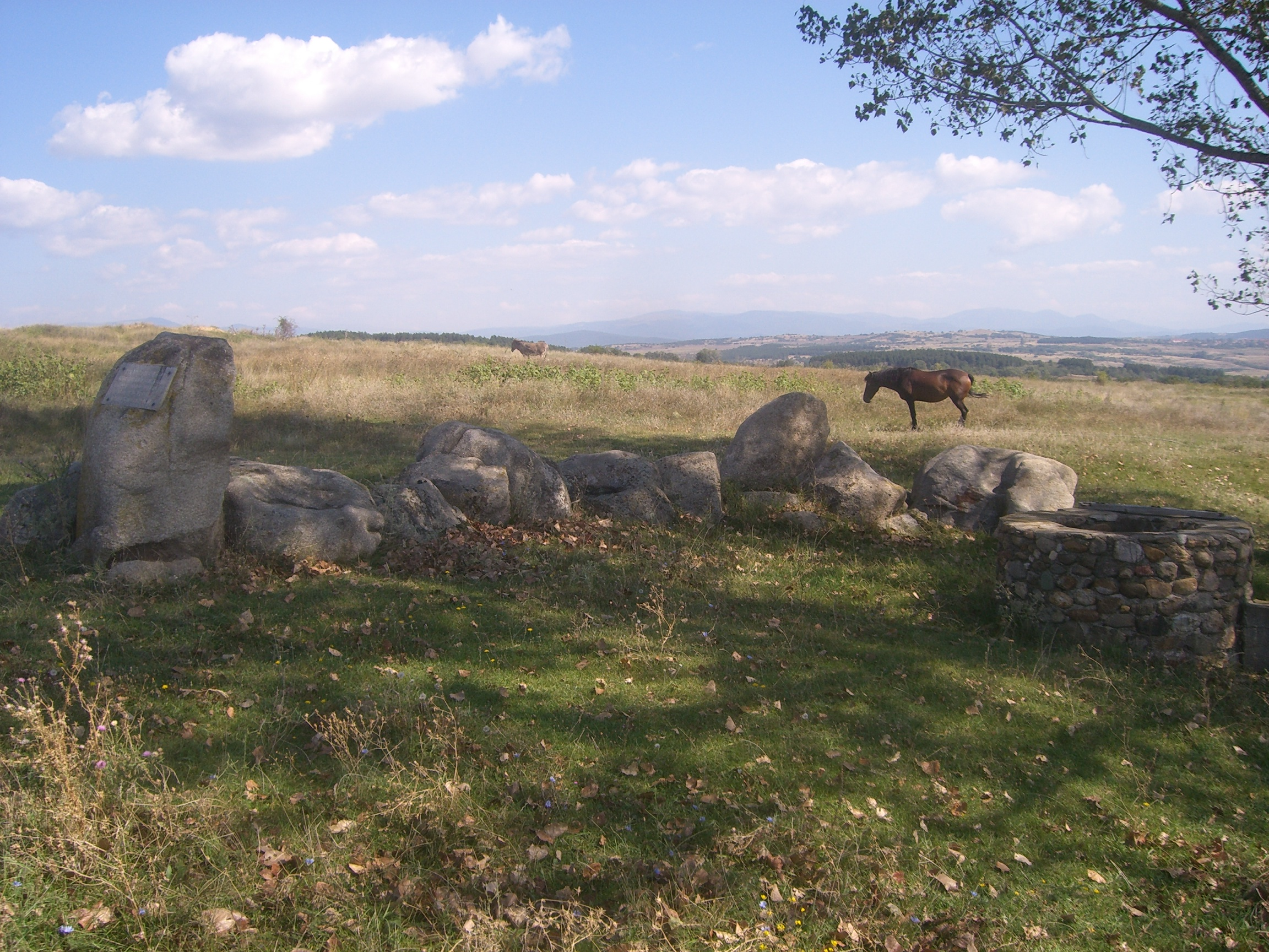 На това място през 1983 г. по случай тържественото чествуване на 60-годишнина от Септемврийското въстание бе поставена паметна плоча и възстановен някогашен кладенец.